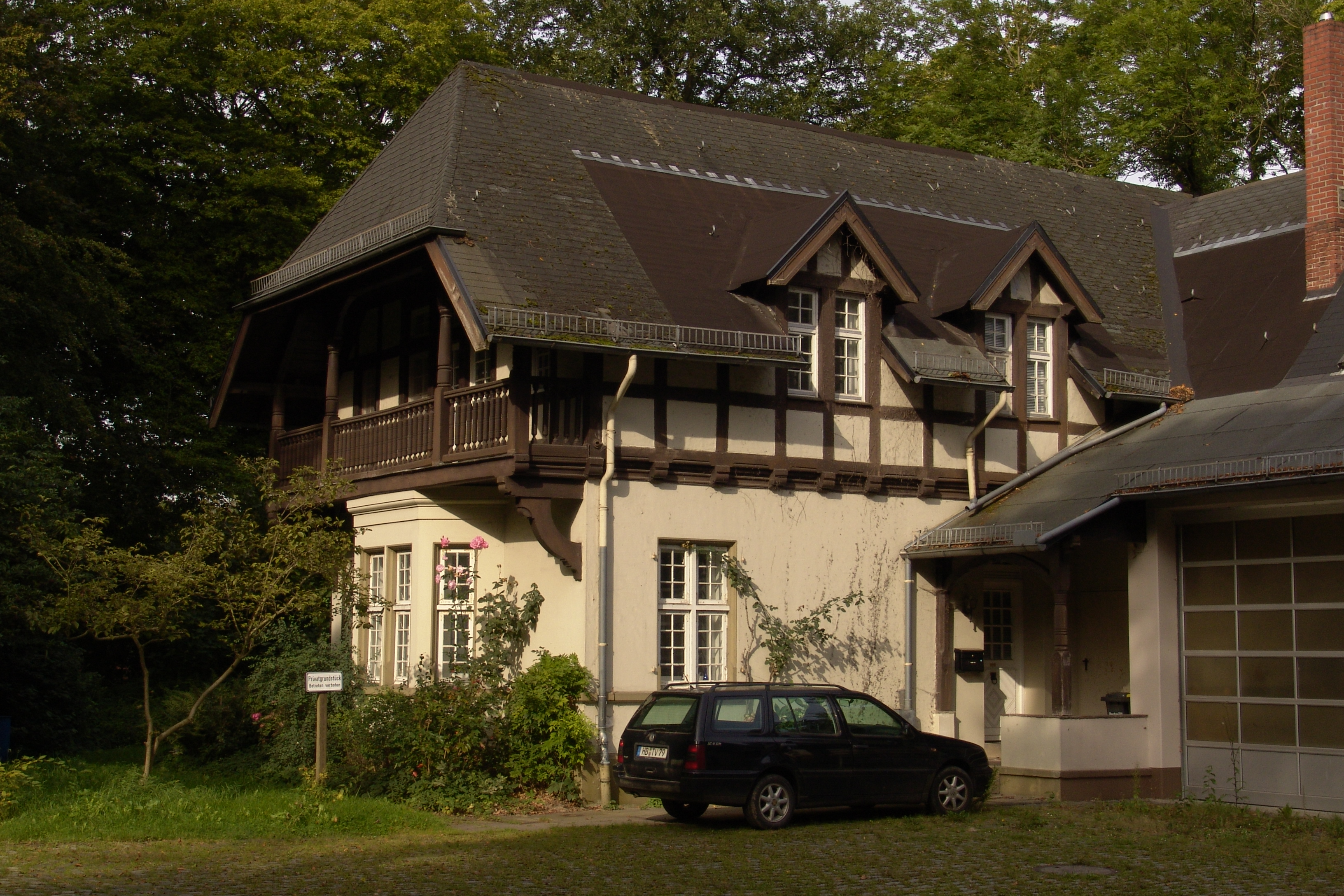 Hofmeierhaus Lesmona in Bremen, Am Kapellenberg 7.Das abgebildete Objekt ist ein geschütztes Kulturdenkmal in der Freien Hansestadt Bremen, mit der Nr. 1885 beim Landesamt für Denkmalpflege registriert.